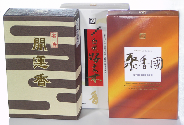 梅栄堂沈香。